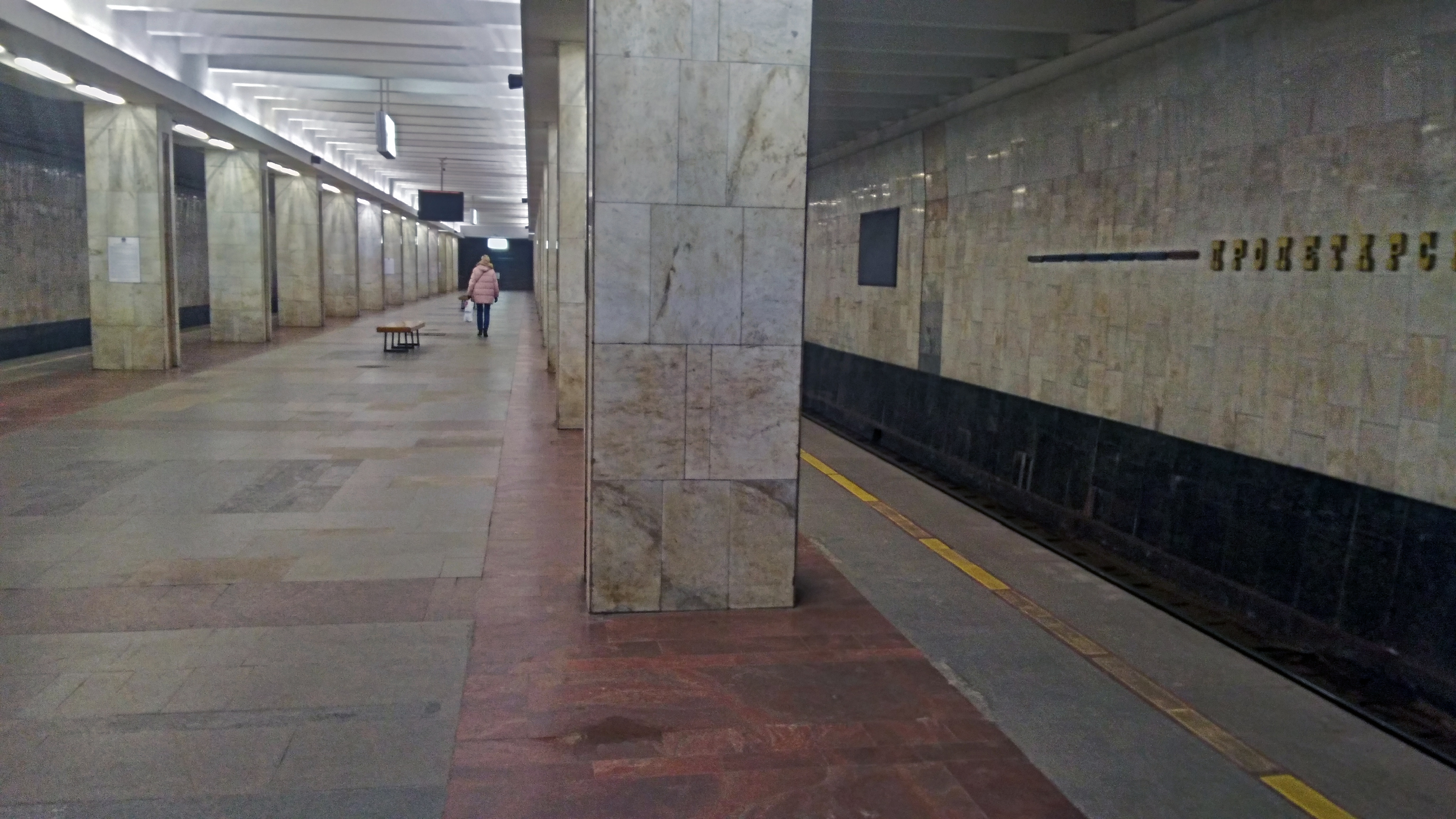 Пустая станция нижегородского метро «Пролетарская» во время карантина коронавируса